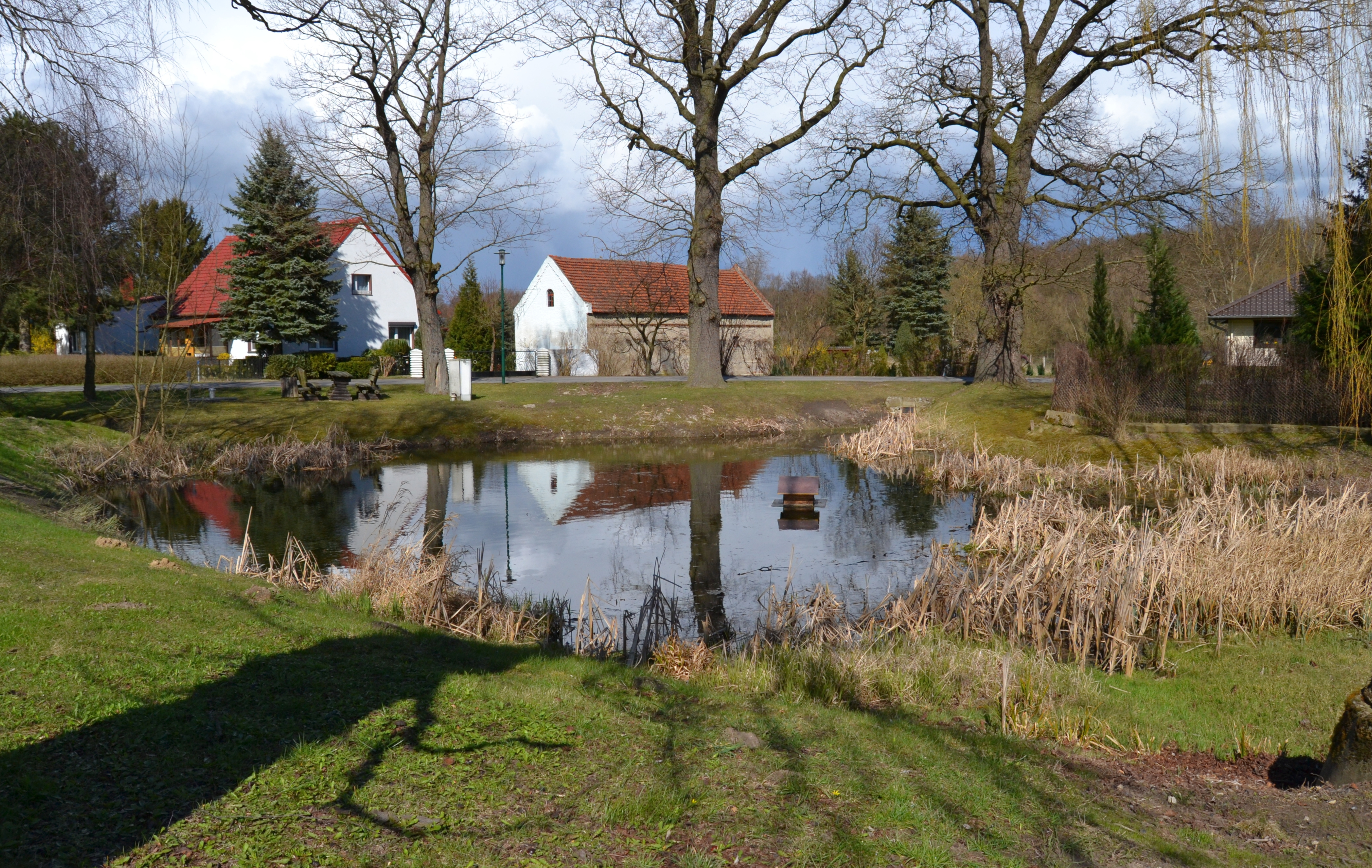 Fotoprojekt – Zwischen Berlin und Oder 2015 Photo project “Between Berlin and River Oder 2015” This template will categorize into Category:Zwischen Berlin und Oder 2015.